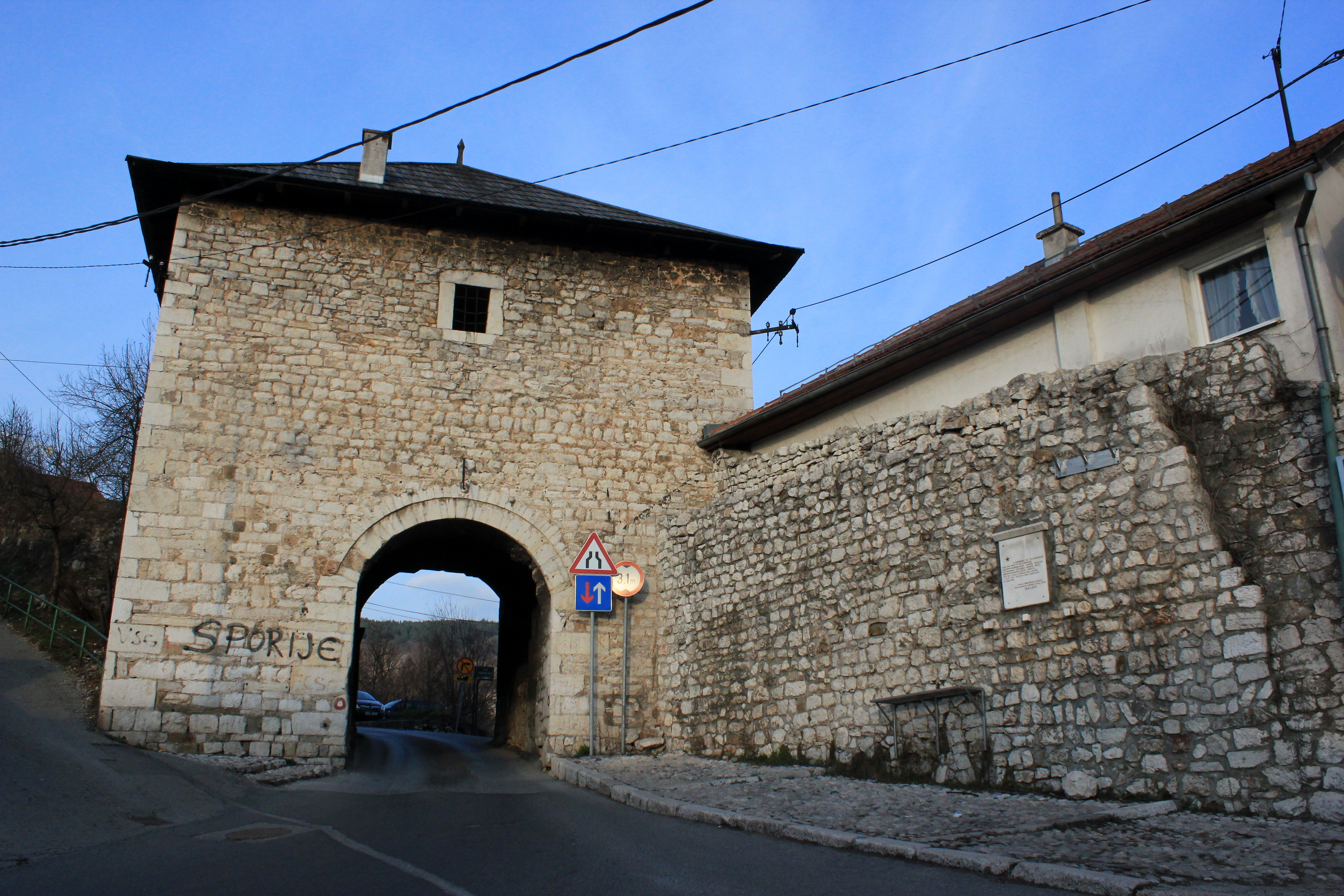 Das Stadttor Višegradska kapija am Ostausgang von Sarajevo.